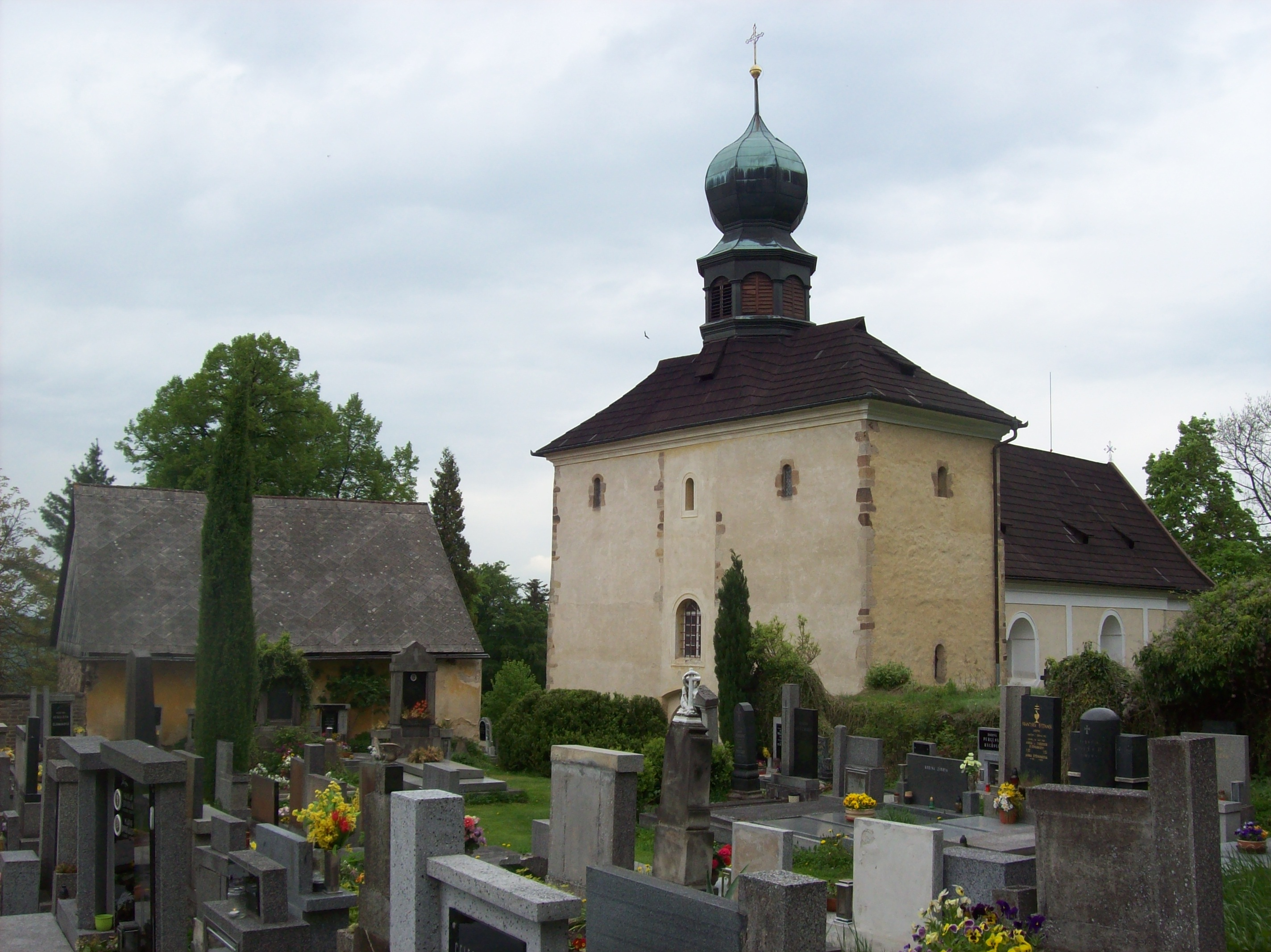 Kublov, vrch Velíz (ČR) - Kostel sv. Jana Křtitele